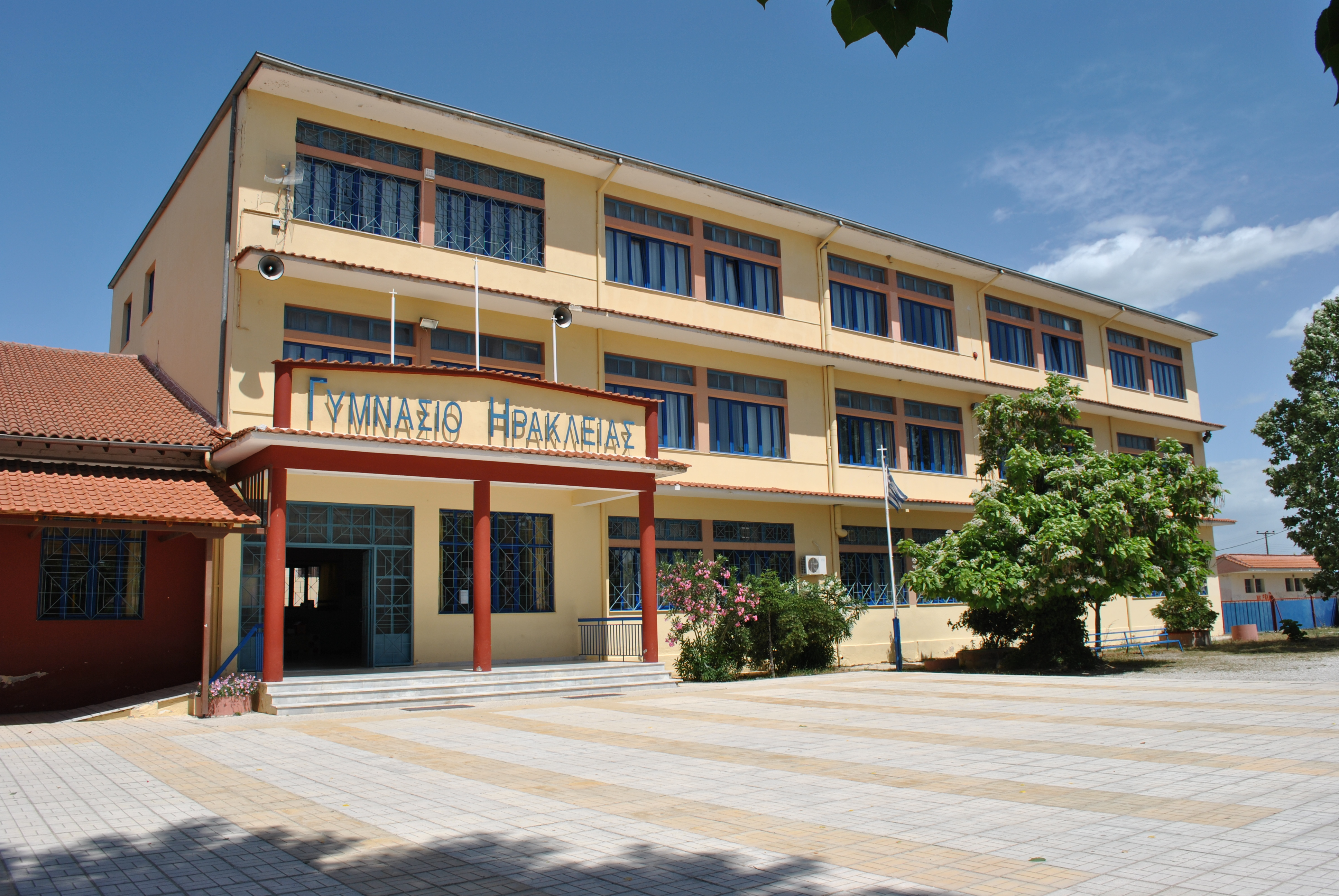 Γυμνάσιο Ηράκλειας